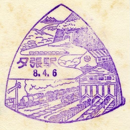 夕張駅スタンプ・1933年